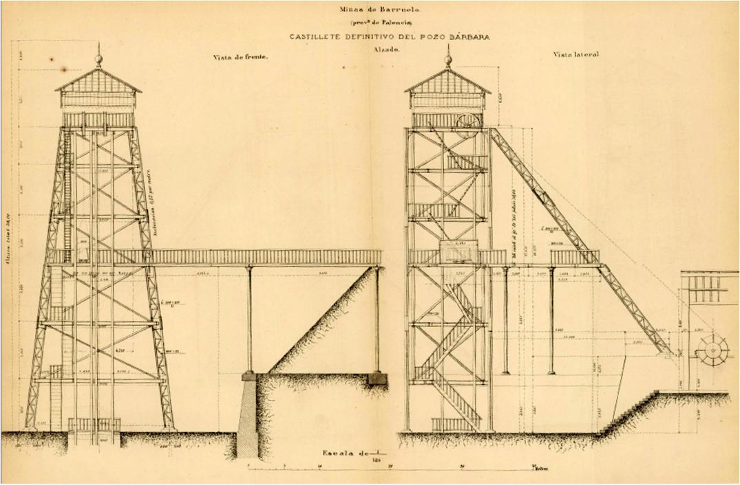 Grabado del castillete instalado en 1883 en el pozo Bárbara, para la extracción del carbón, en Barruelo de Santullán (Palencia), España.